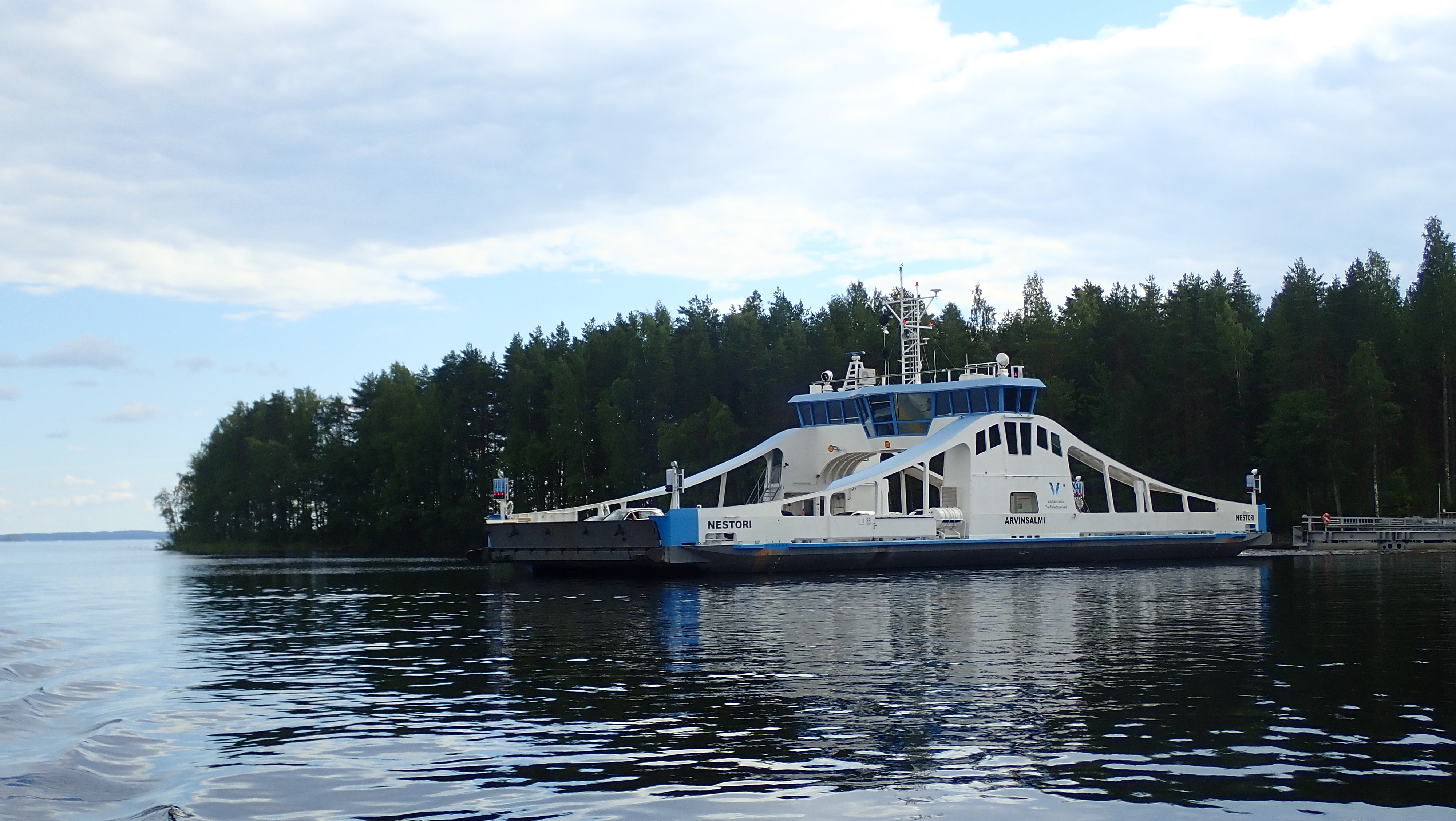 Nestori-lossi Arvinsalmessa